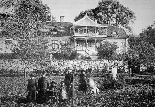 Tullinge gårds huvudbyggnad (som brann ner 1943)